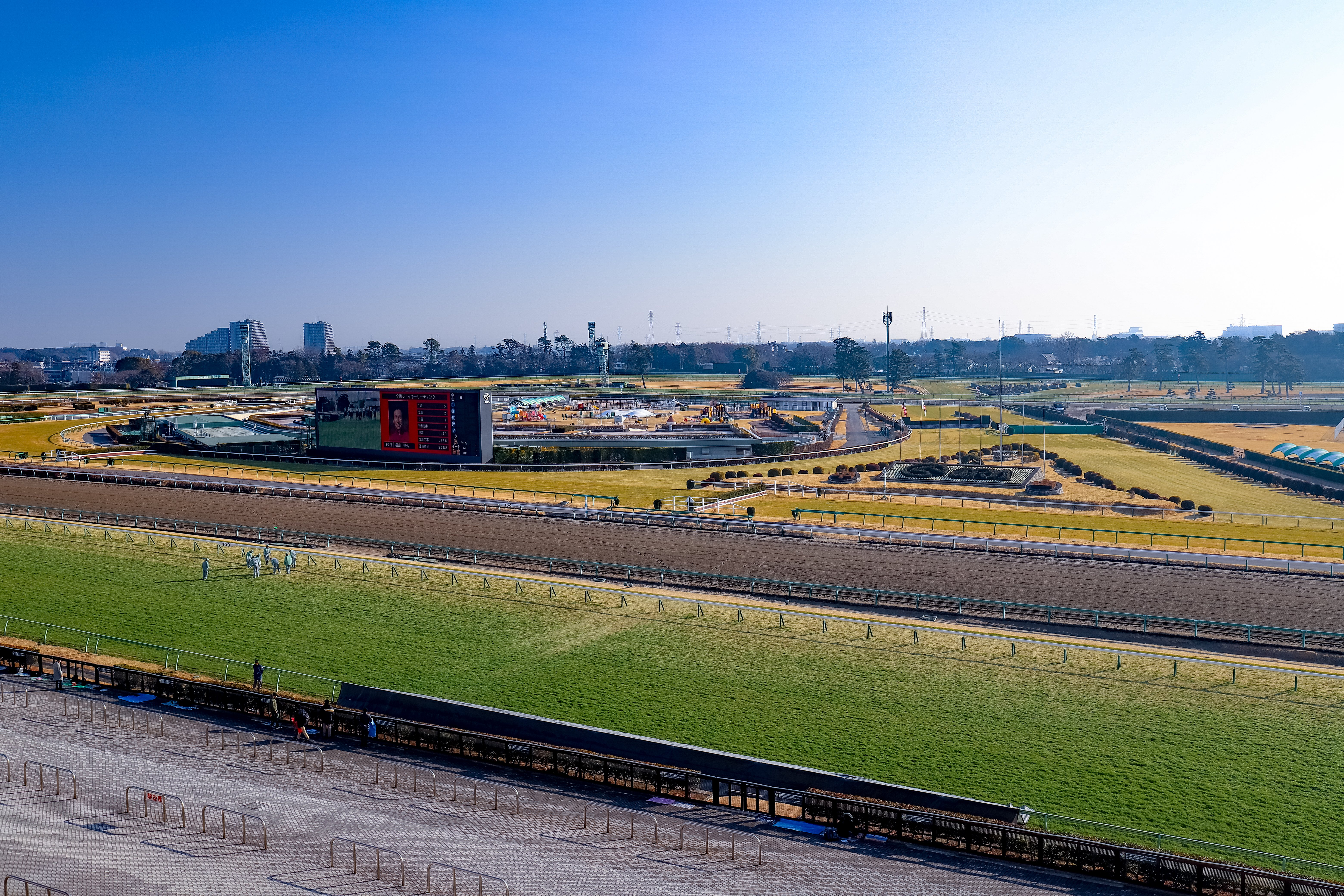 千葉県船橋市、中山競馬場